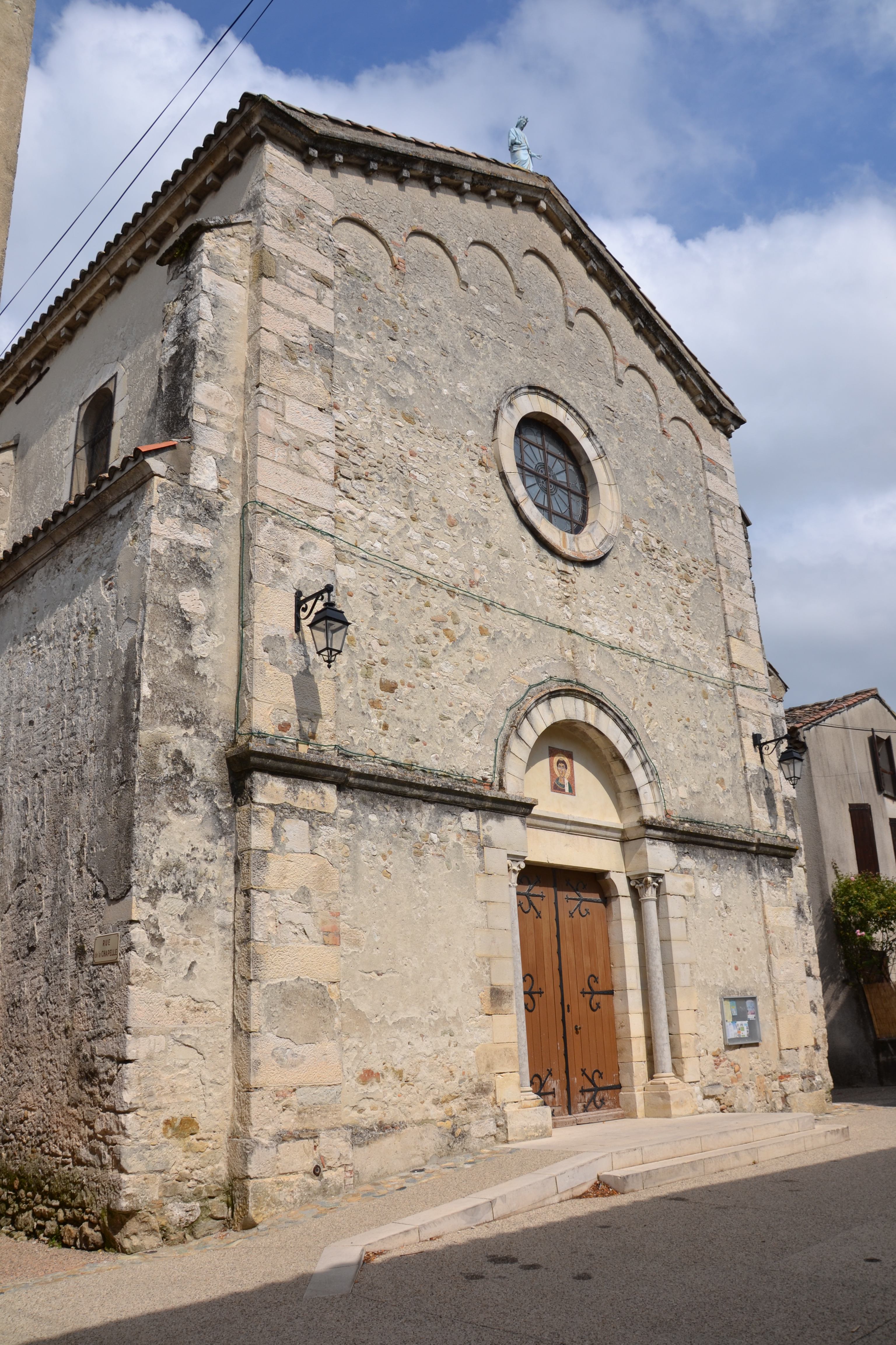 église d'Espeluche